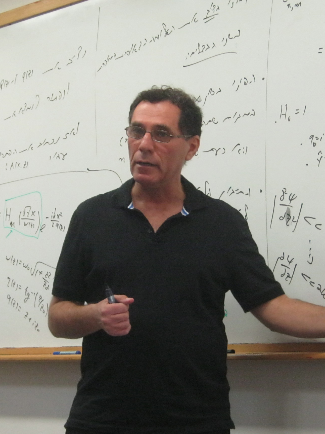 מוטי שגב